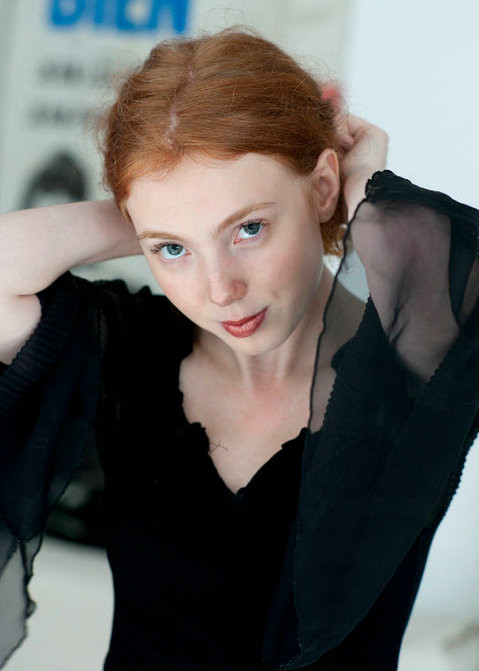 Daphné Baiwir - Comédienne et Réalisatrice